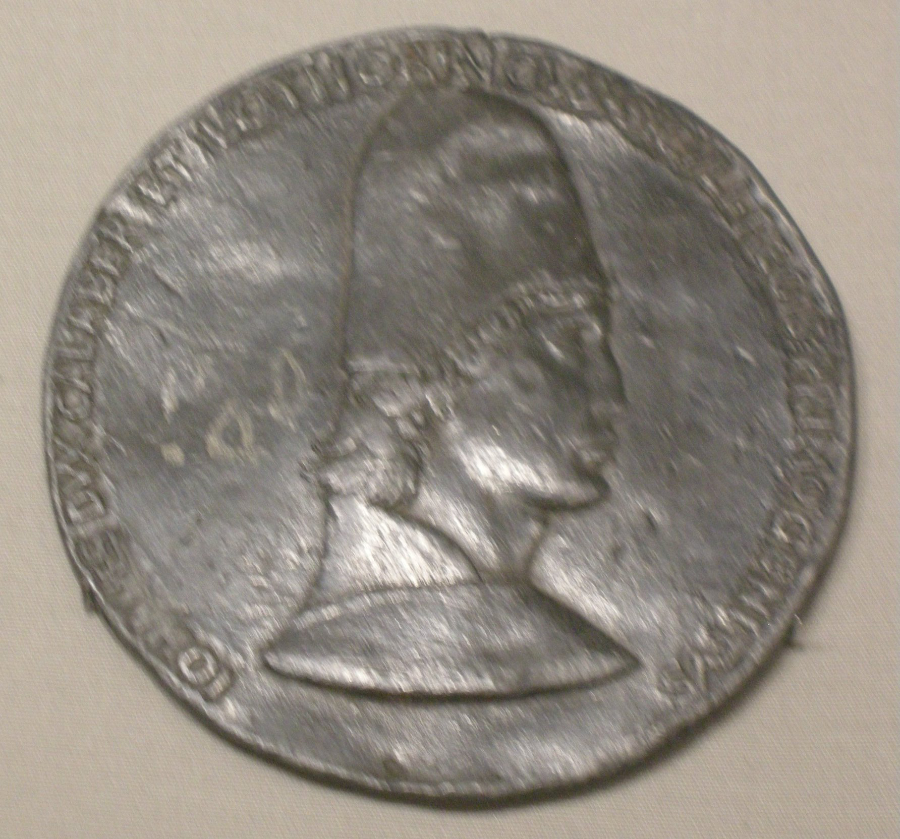 Jean II d'Anjou, duc de Lorraine ; médaille de 1464 de Francesco Laurana ; conservée au Metropolitan Museum of Art, New York City